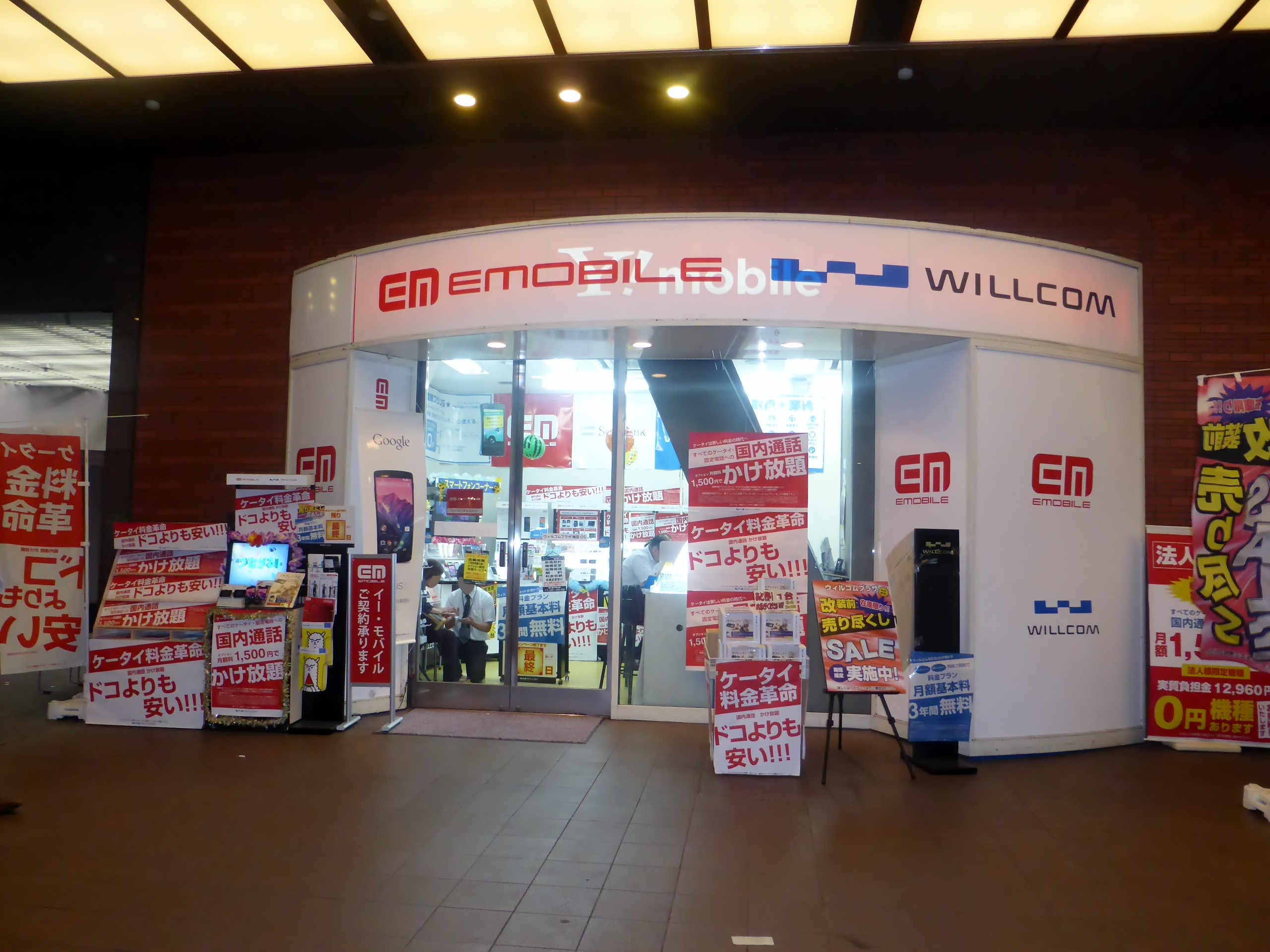 2014年7月31日（ウィルコムおよびイー・モバイルブランド最後の日）時点のウィルコムプラザ梅田OSを撮影。